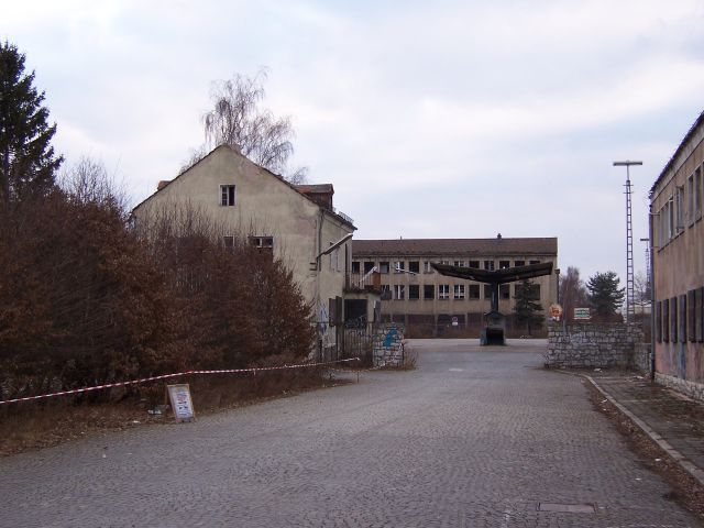 KBw Nürnberg